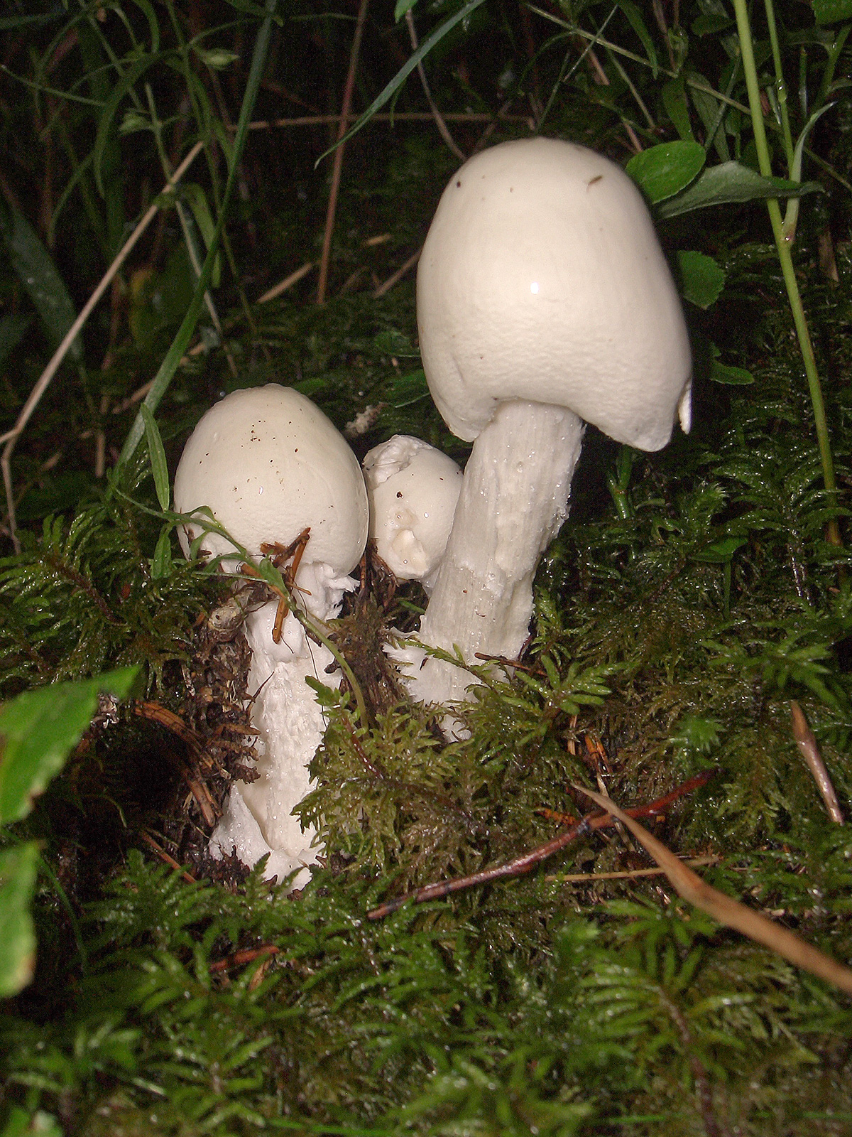 Amanita virosa - Bellamonte (TN), Italy - 08/2006 foto personale - (c) B.Baldassari